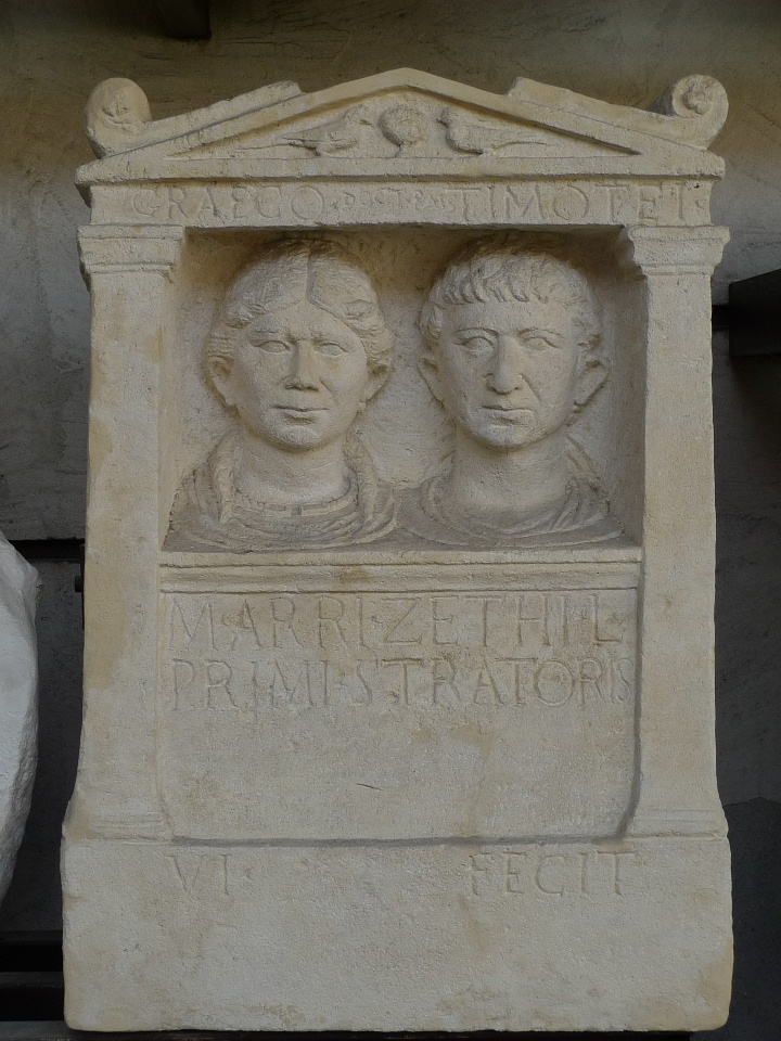 Museo Lapidario Maffeiano in Verona: Römische Grabstele im Säulengang - 1. Jahrh. n. Chr. - Fundort: Umgebung von Padua